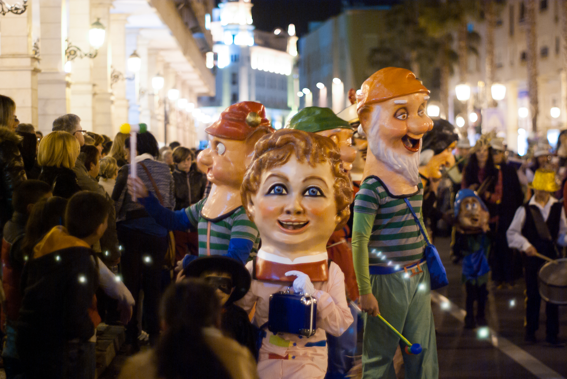 Carnaval de Ceuta, 16/02/2013